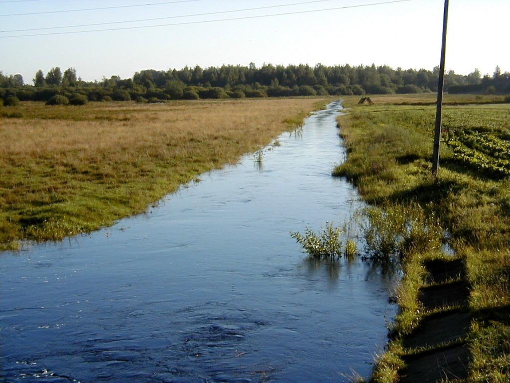 река Кира